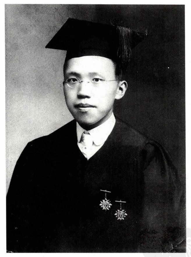 中文（台灣）: 張孝騫院士